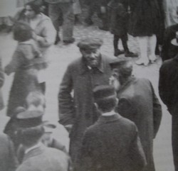 Żydzi na ulicy w Turku // Jest to skan z książki "Dzieje Turku", autor zdjęcia zmarł prawdopodobnie 70 lat temu, jednak nie wiem, czy ta licencja odpowiada (proszę o kontakt na stronie dyskusji)